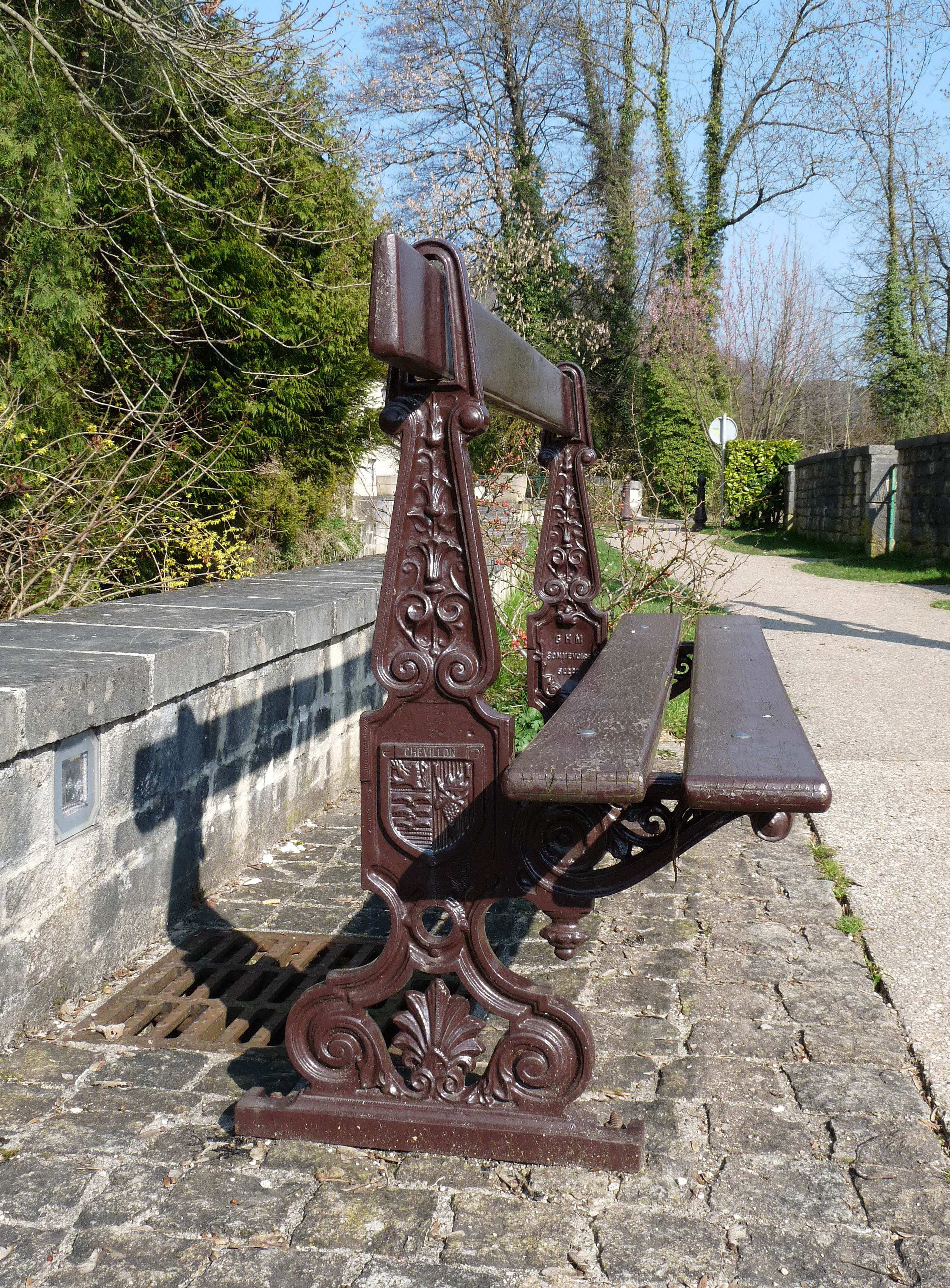 Banc public en fonte à Chevillon (Haute-Marne), réalisé par GHM (Sommevoire).